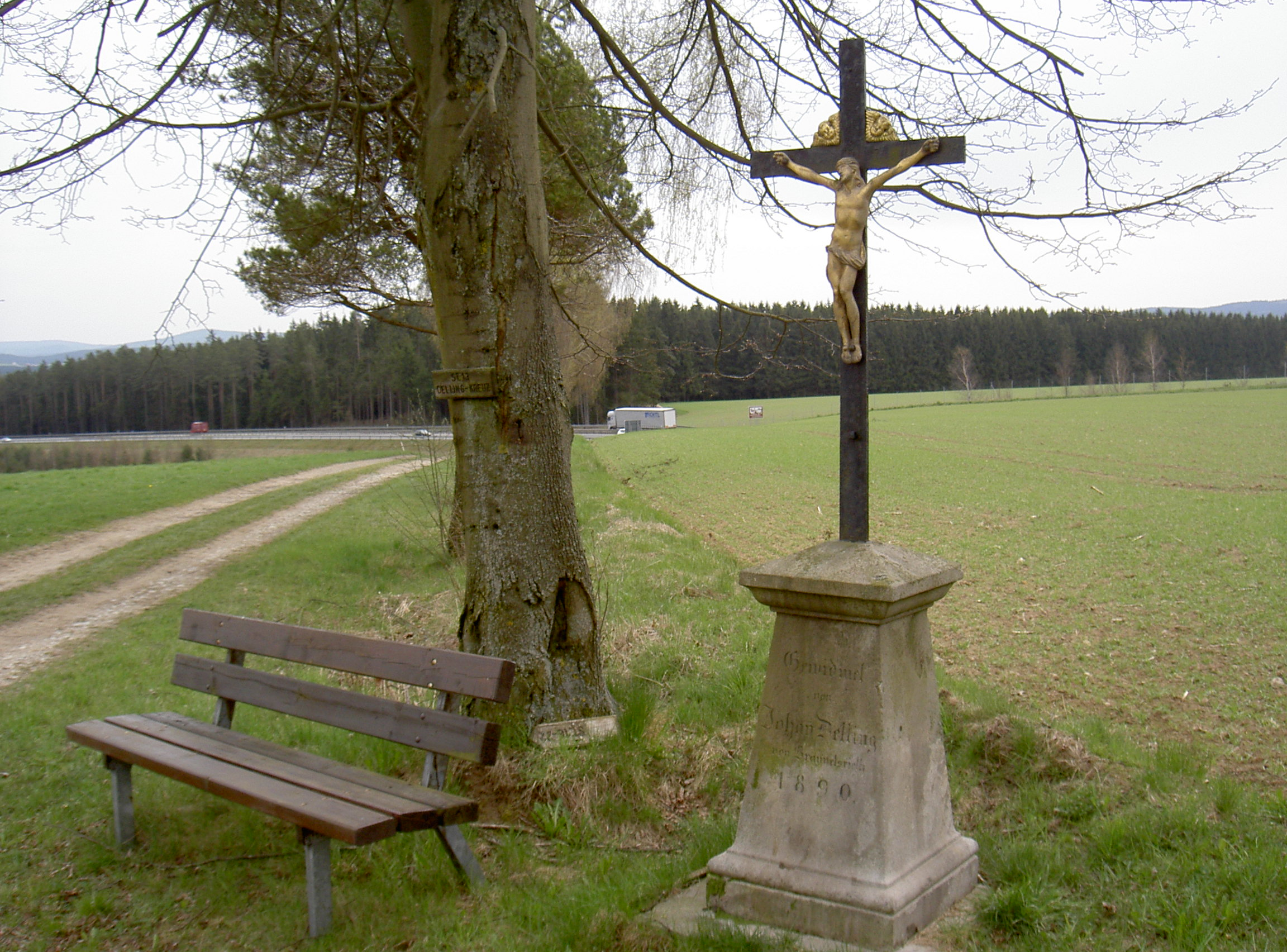 Delling-Kreuz